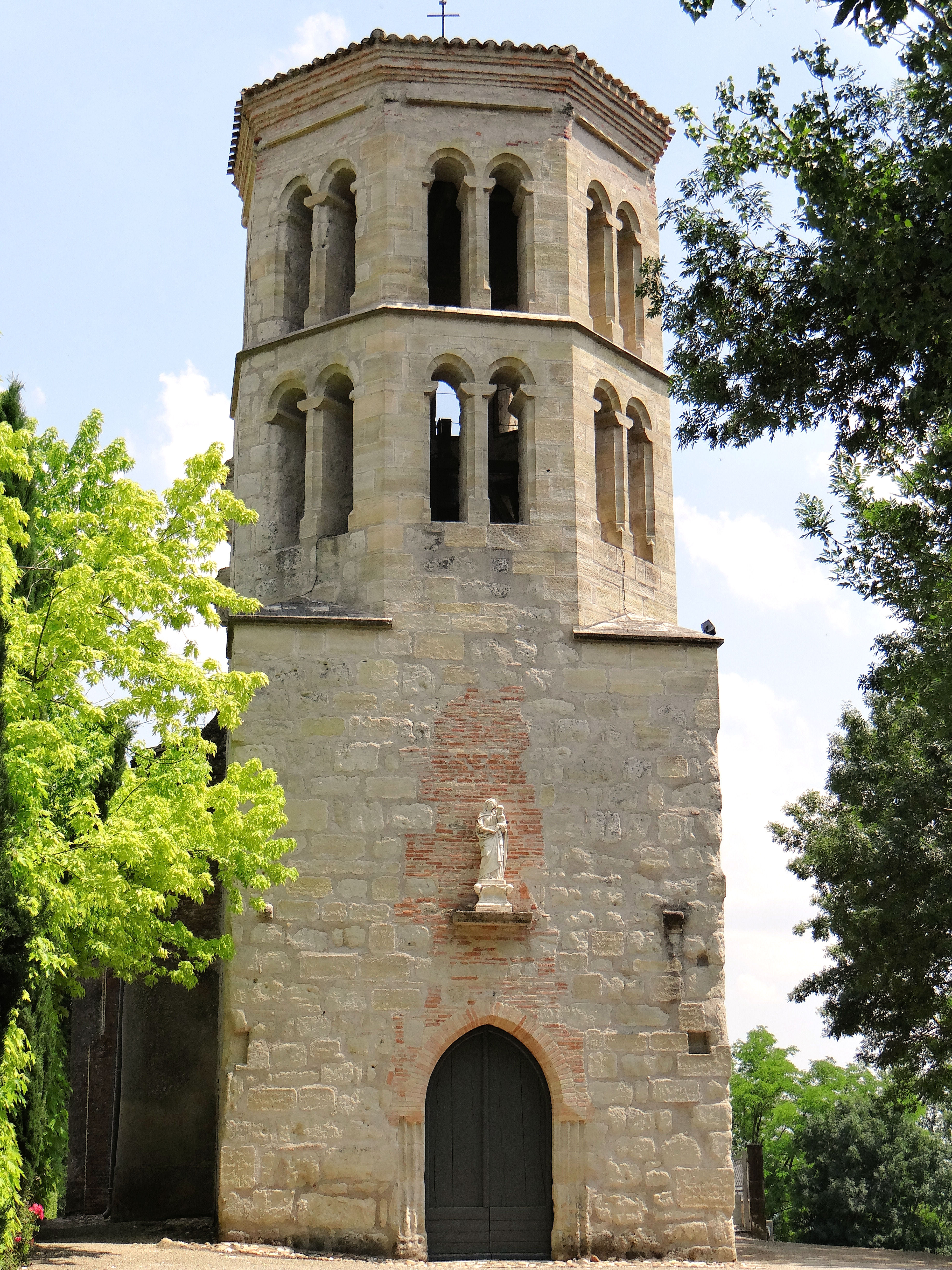 Mirabel - Église Notre-Dame-des Misères - Clocher